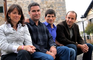 Torrelodones. Concejales de Vecinos por Torrelodones de las legislatura 2007-2011.